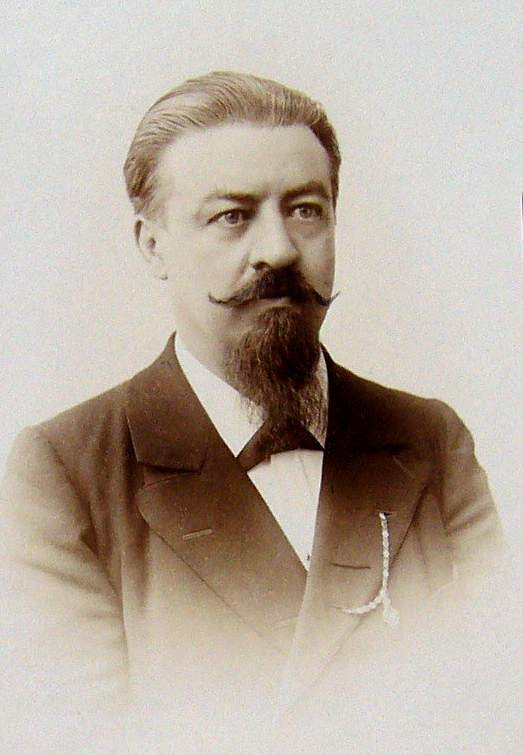 Hugo Fux von Volkwarth (1844 - 1907), Moravský právník a politik